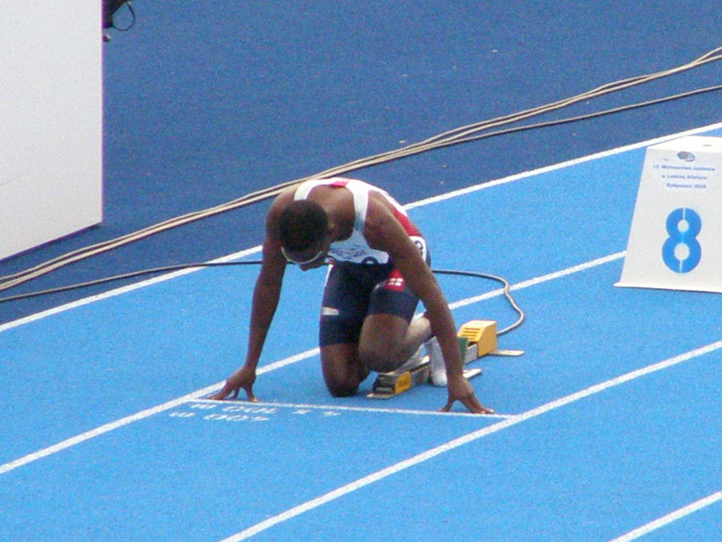 Mistrzostwa Świata Juniorów w Lekkoatletyce - Bydgoszcz 2008 - Marcus Boyd